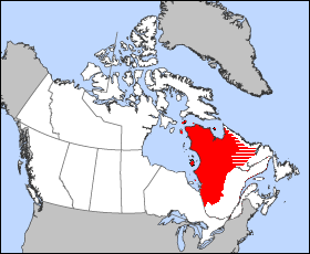 Territoire approximatif du district de l'Ungava des Territoires du Nord-Ouest, Canada, de 1895 à 1898. Le district comprend les îles au large des côtes maritimes à partir de 1897. La frontière orientale n'est fixée qu'en 1927. Modification de "